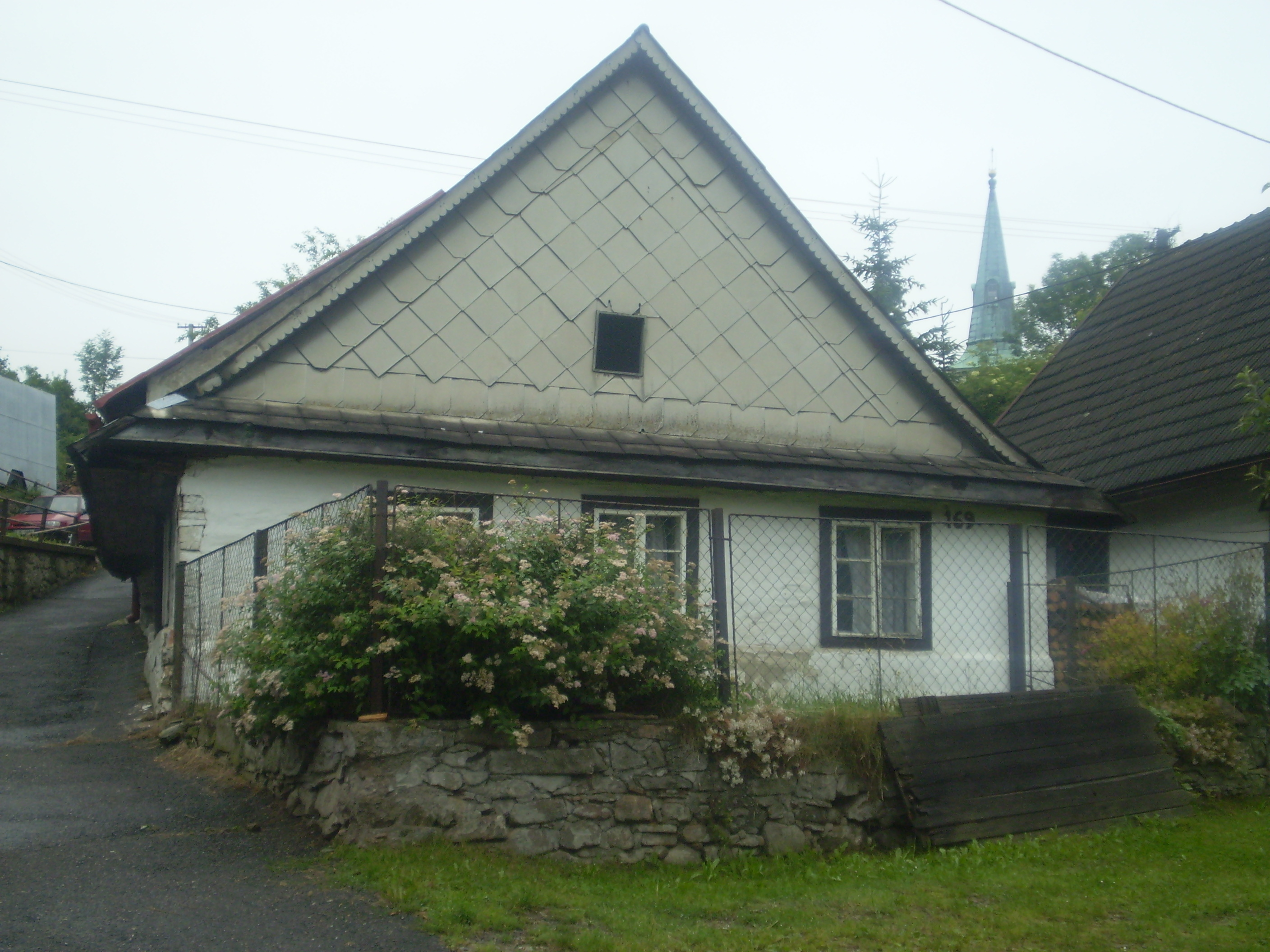 rodný dům pátera Jaroslava Popelky, Hliník 169, Jimramov.